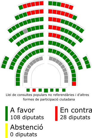 Llei de consultes populars no referendàries i d'altres formes de participació ciutadana al Ple del Parlament de Catalunya